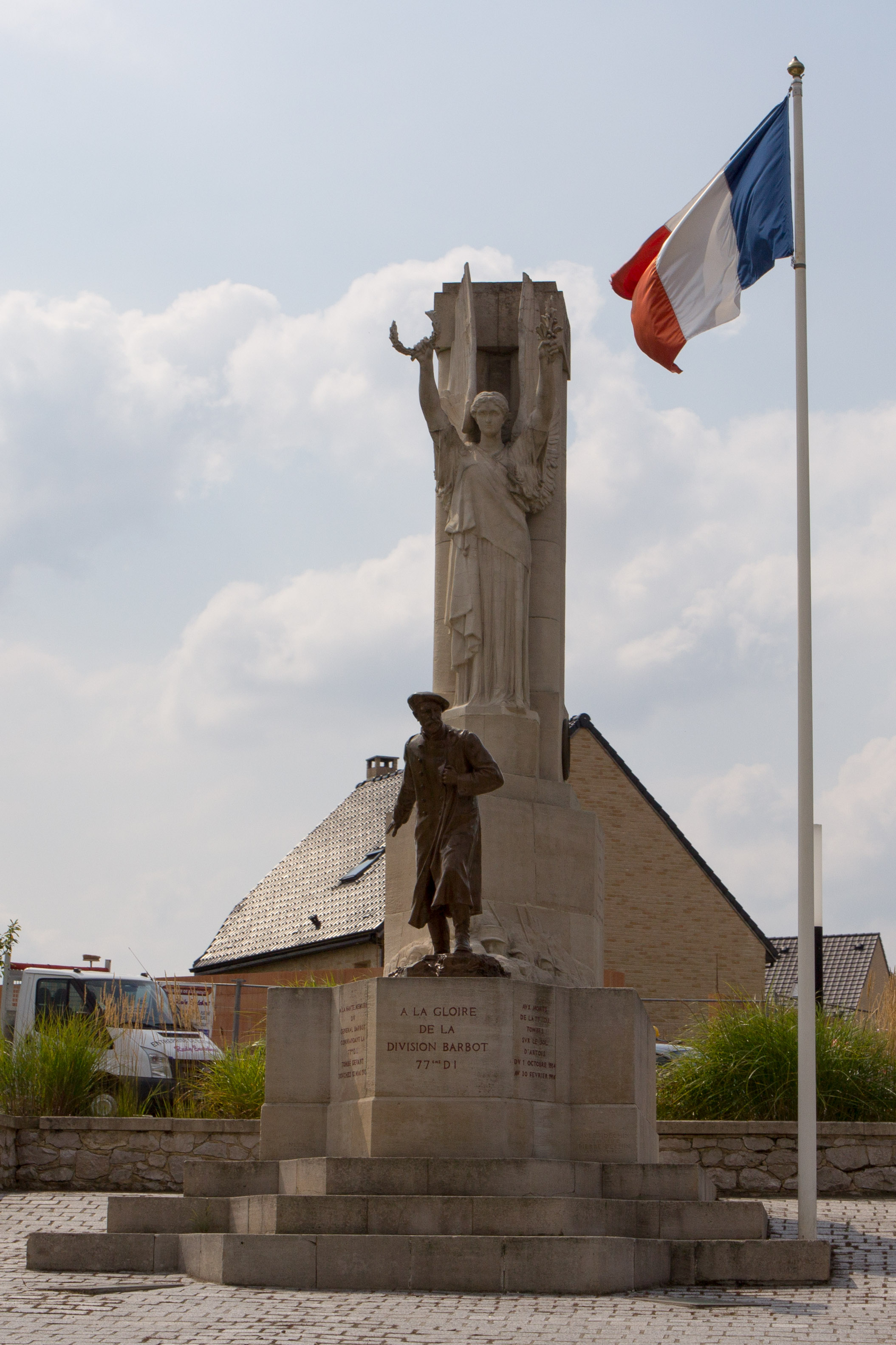 Monument à la mémoire du général Barbot / Souchez / Pas-de-Calais / France